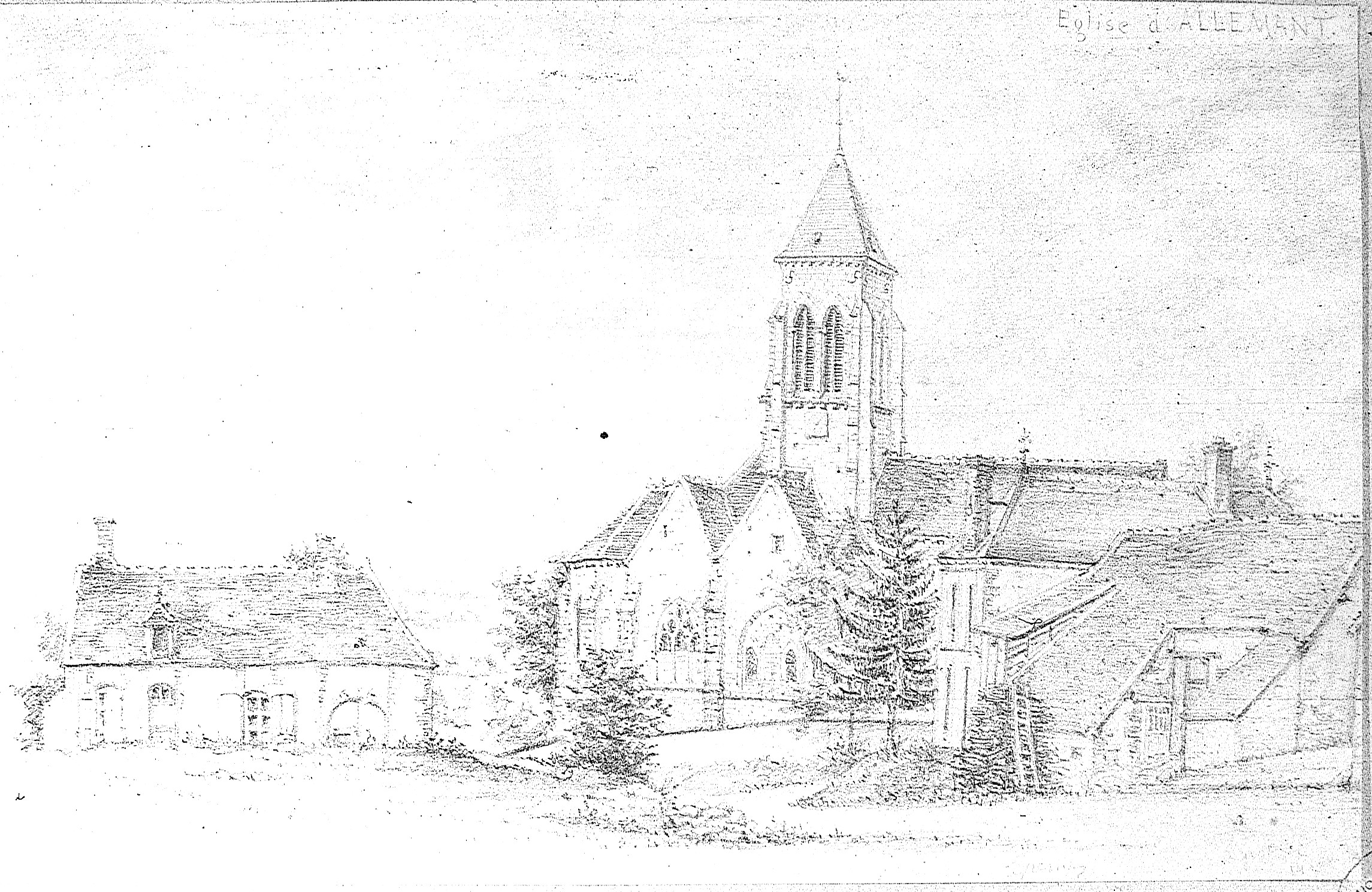 une vue de cf. titre.